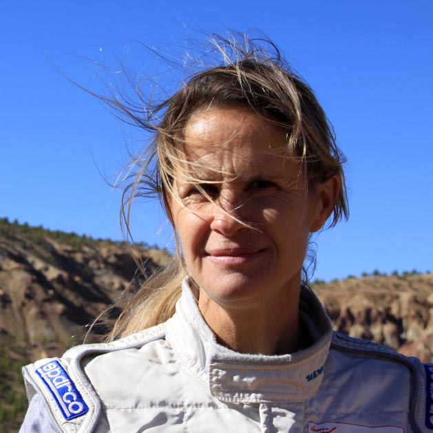 Pilote de rallye Maroc 2011